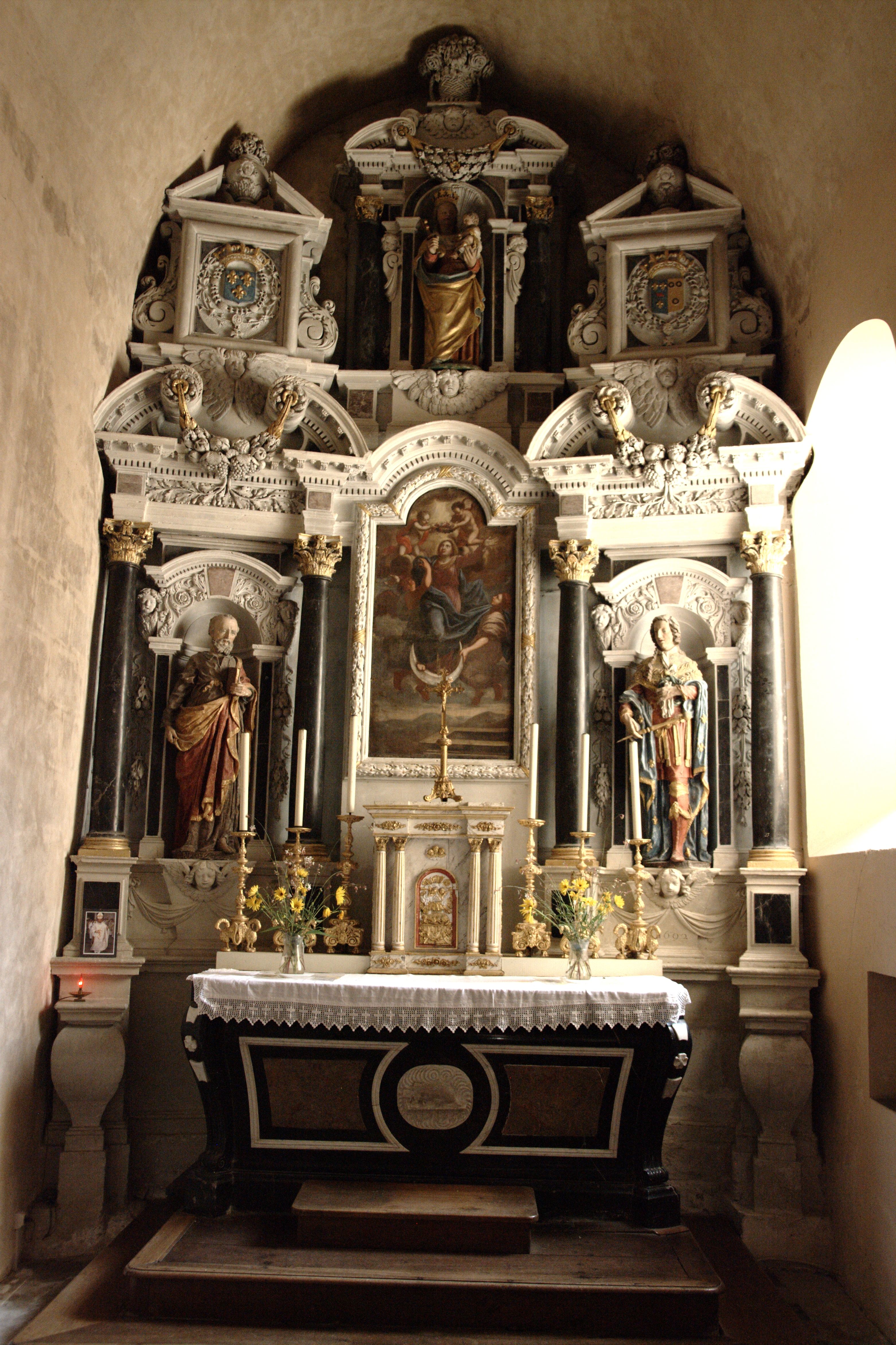 Le retable (1692) de l'église Notre-Dame à Saulges, Mayenne.